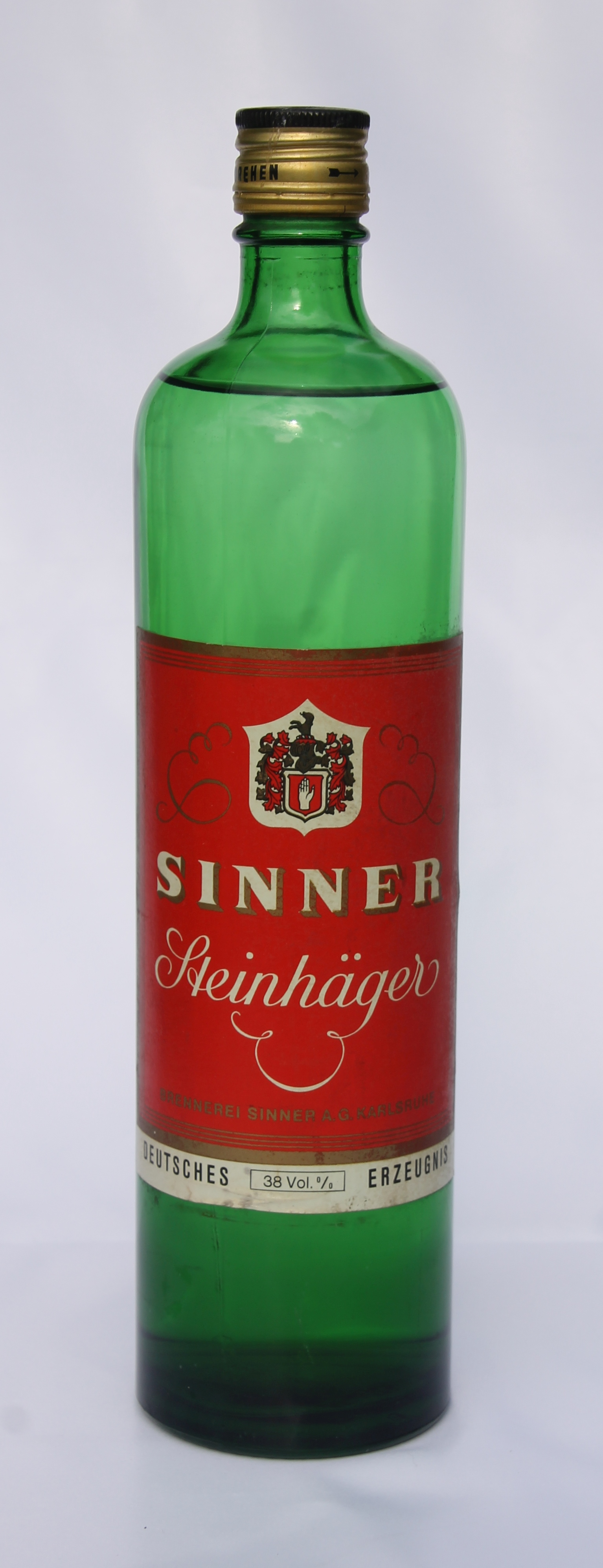 Steinhäger-Variante